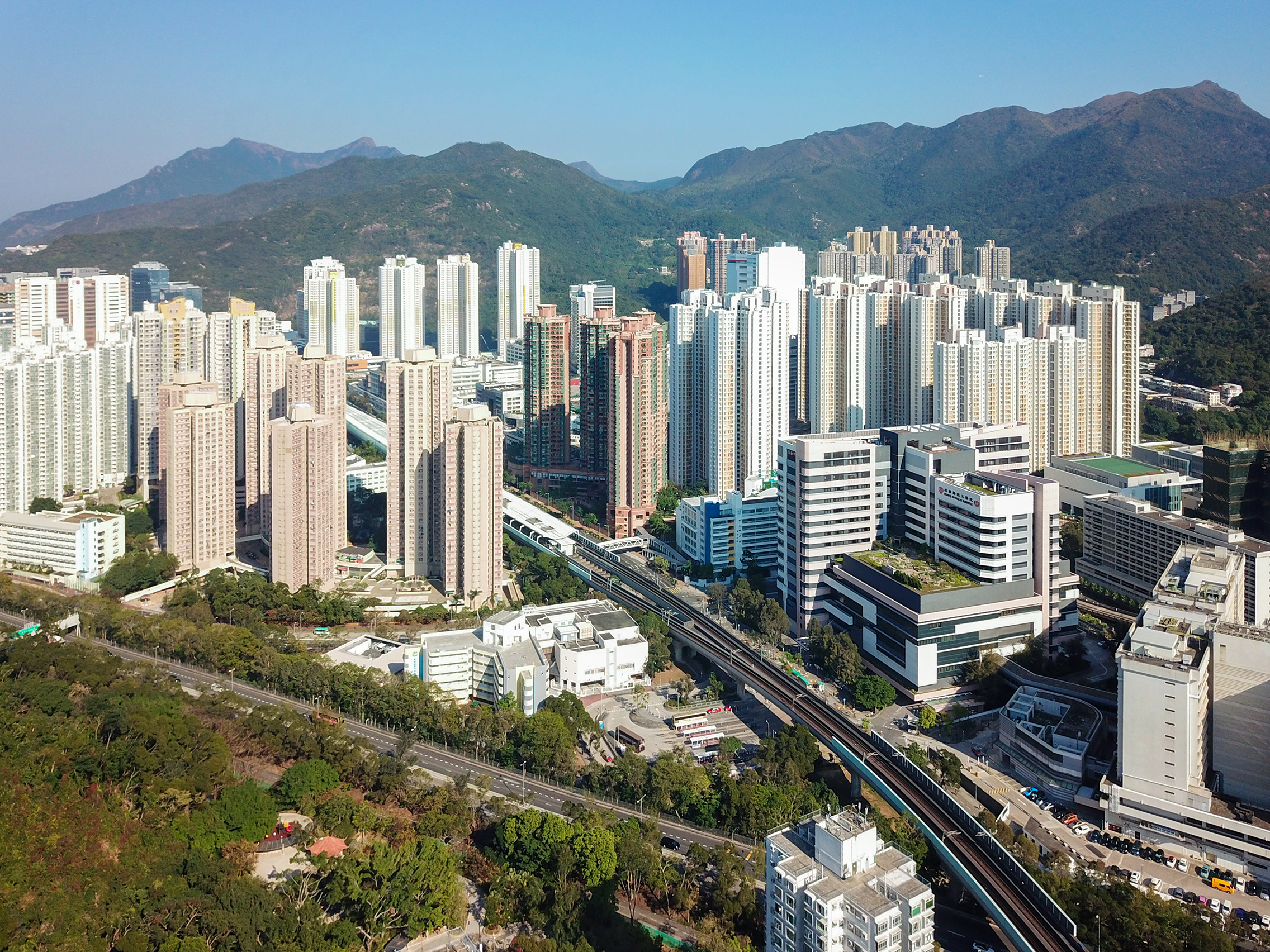 Yuen Chau Kok Buildings